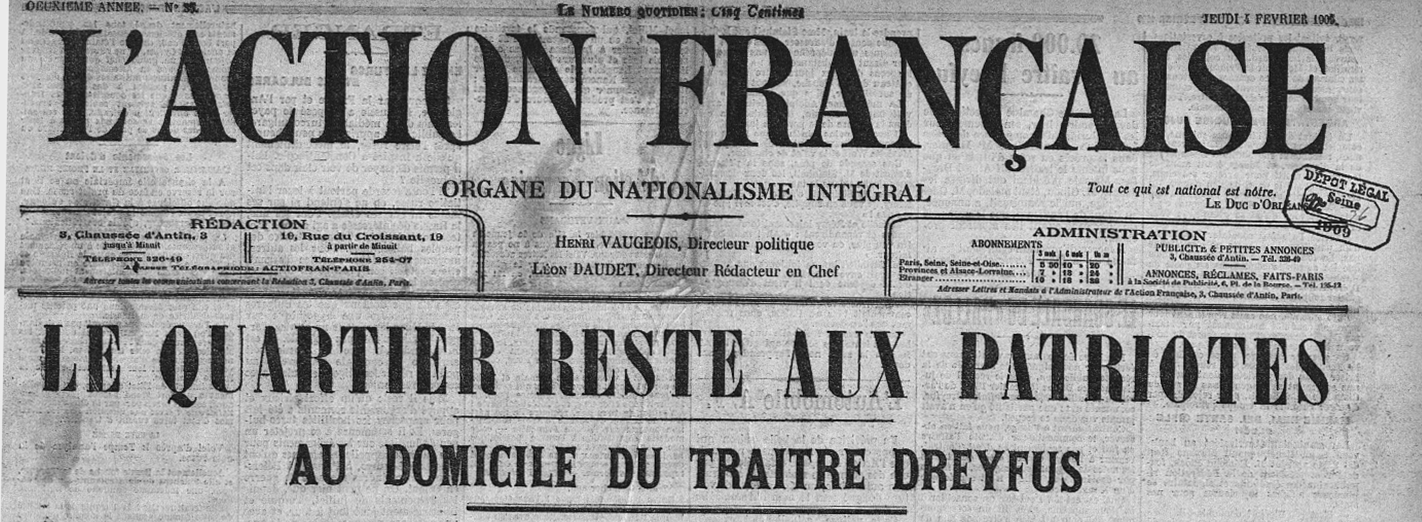 Une de L'Action française du 4 février 1909. Le journal relate dans ses moindres détails les événements parfois violents entourant un défilé de 3000 manifestants antidreyfusards, avec à leur tête Charles Maurras et Léon Daudet, dans les rues du Quartier latin. Quelque 300 étudiants s'étaient également rendus conspuer Alfred Dreyfus à son domicile au 101 Boul. Malesherbes (« c'est là que demeure le misérable » précise l'article).